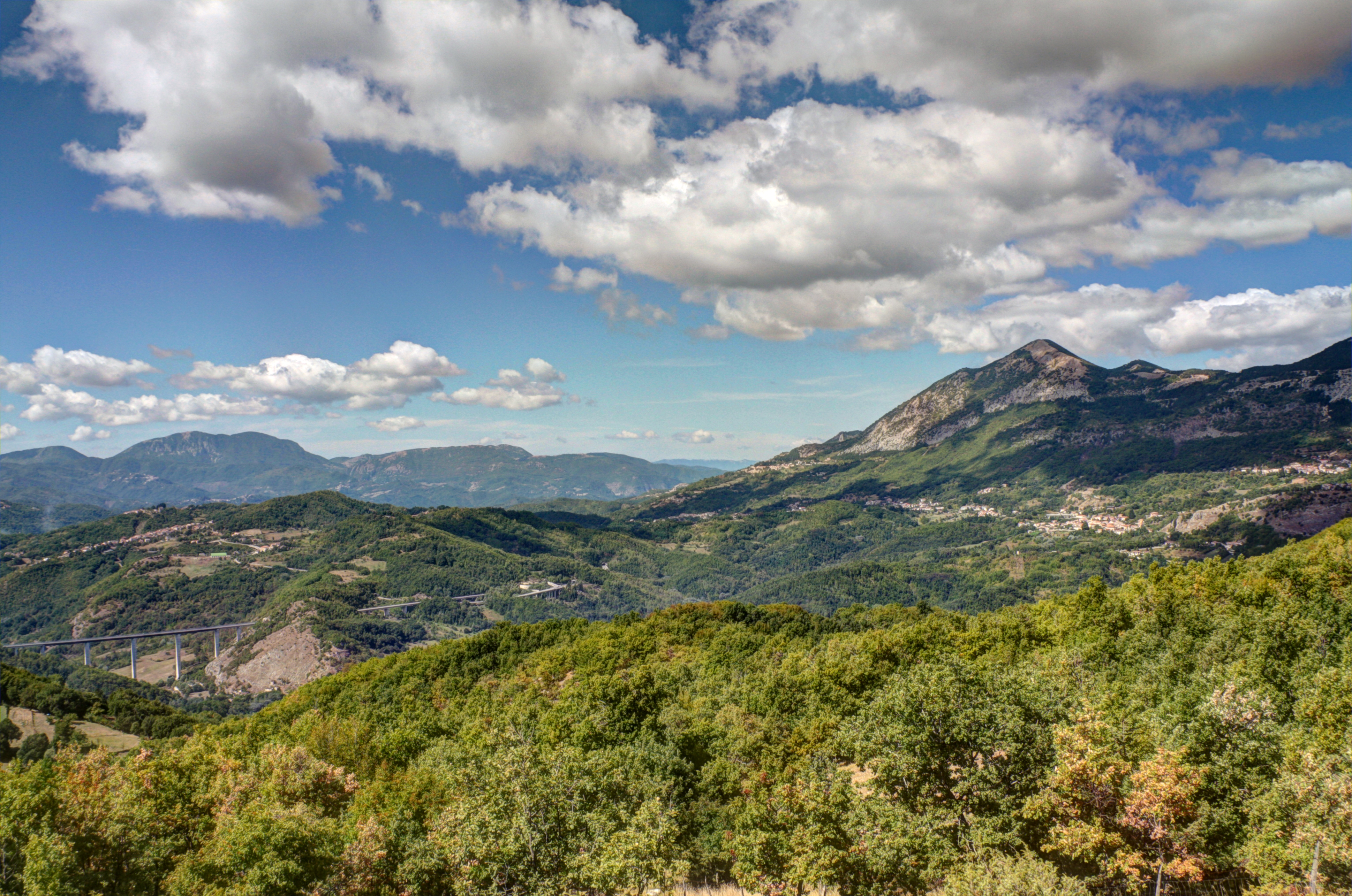 Panoramica del Cicolano, Settembre 2010